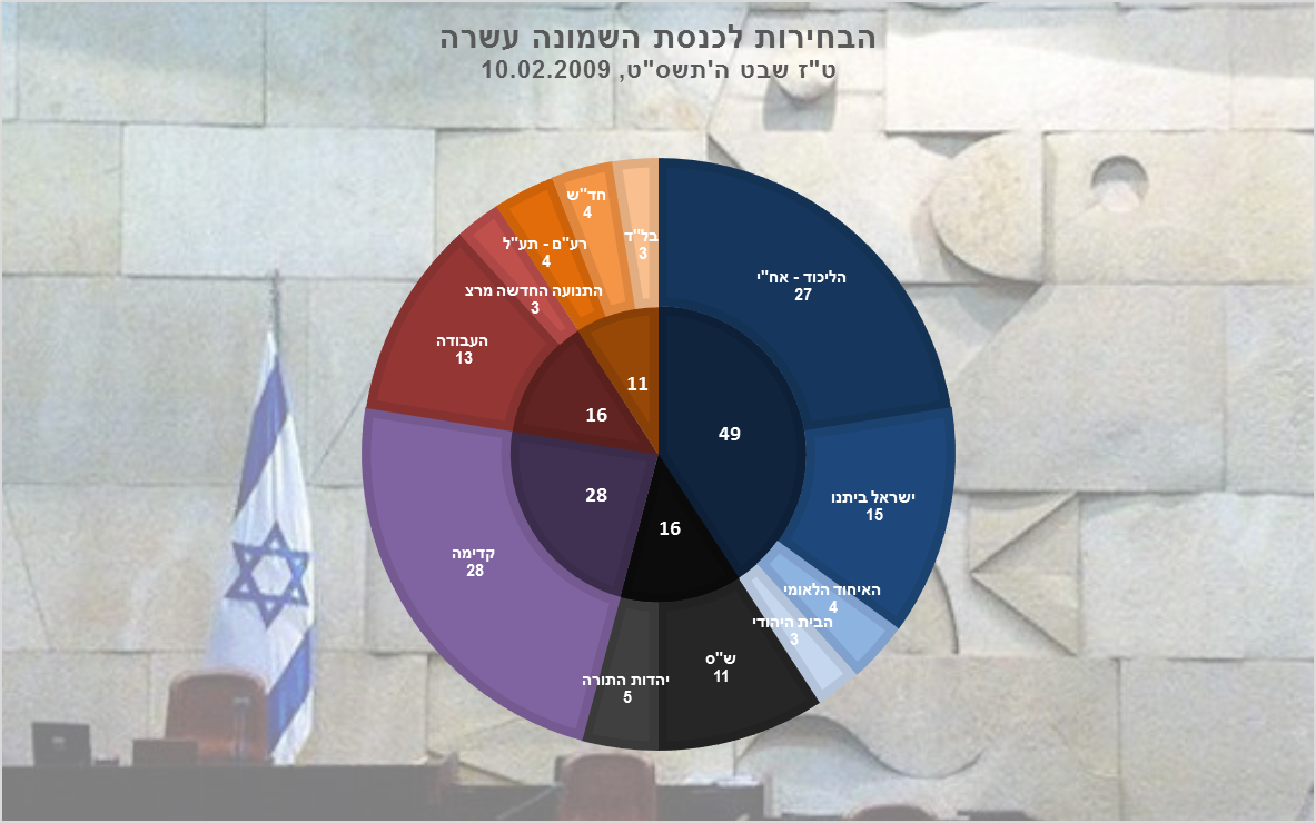 תוצאות הבחירות לכנסת השמונה עשרה